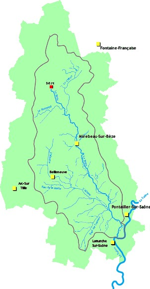 Carte réalisée à partir de celle présente dans la Lettre d’information du Contrat de bassin de la Bèze et de l’Albane numéro 1 - Fév. 2010, page 1. Les communes mentionnées (figurés ponctuels jaune) représentent les stations de mesure hydrauliques. La source de la Bèze est figuré par un ponctuel rouge. Le bassin versant est figuré par une surface de couleur verte.